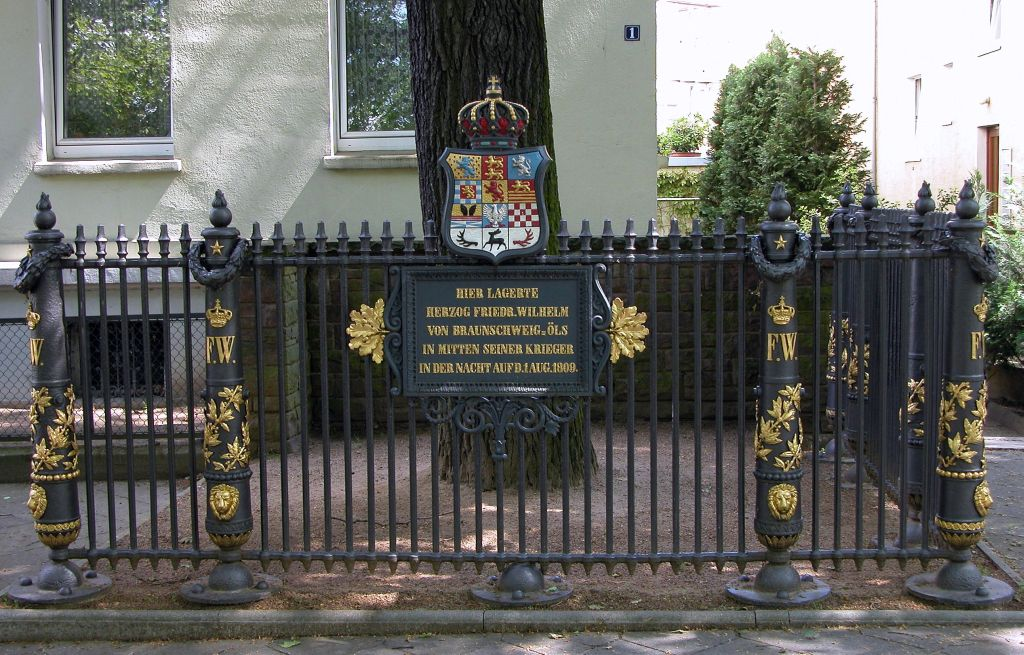 Braunschweig: Rastplatz des „Schwarzen Herzogs“ in der Nacht auf den 1. August 1809 vor der Schlacht bei Ölper